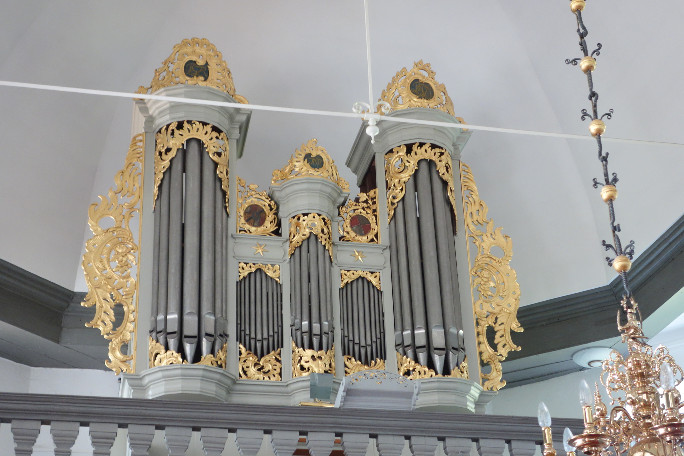 Orgel Dorfkirche Breitenberg, Steinburg, Schleswig-Holstein, Deutschland